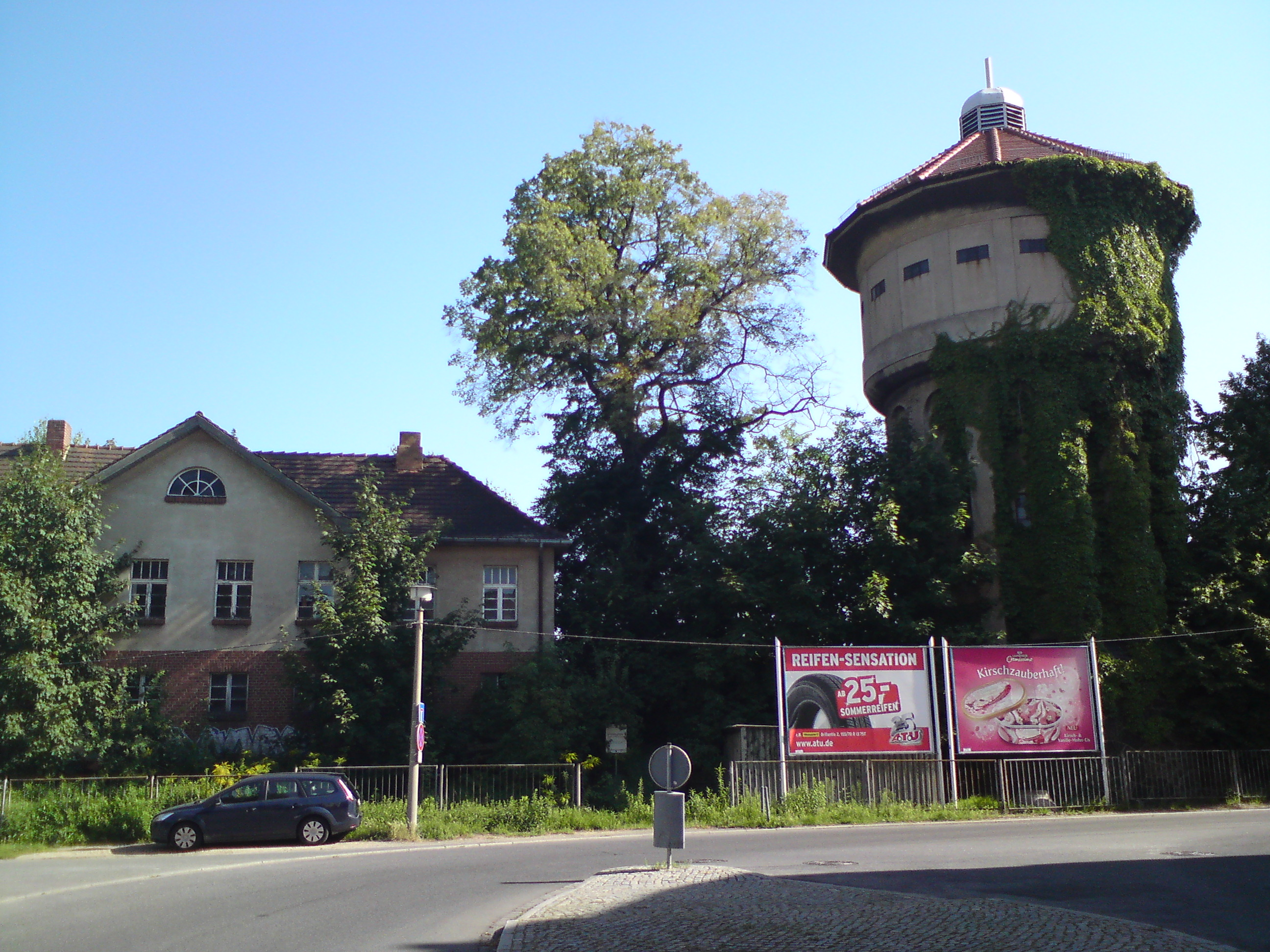 Der Wasserturm des Bahnhofs Görlitz an der Sattigstraße Ecke Melanchthonstraße